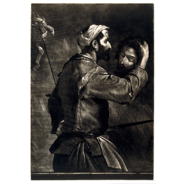 Mezzotinto par Ruprecht von der Pfalz